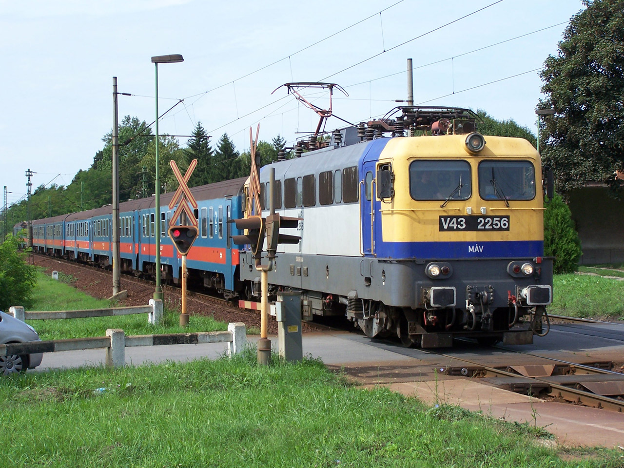 V43-2256 Pusztaszentistvánon